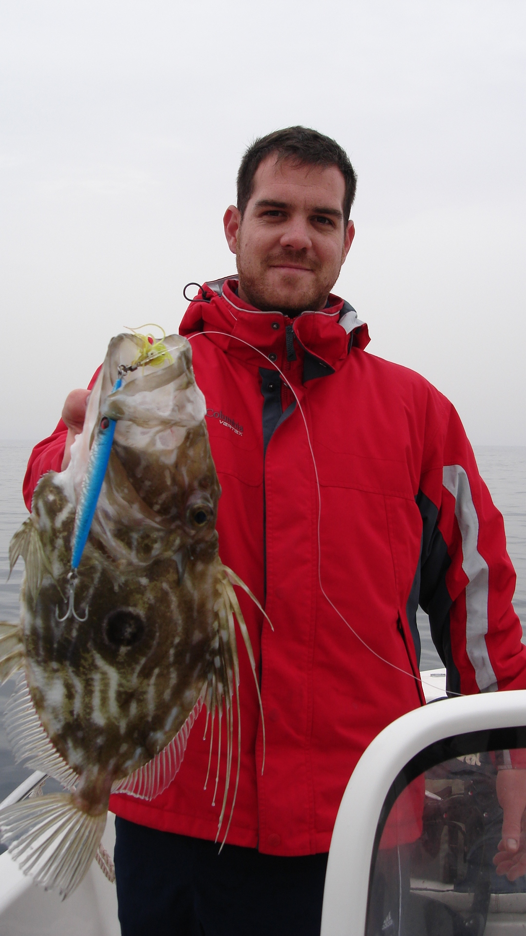 Pez de San Pedro pescado a la modalidad de Jigging